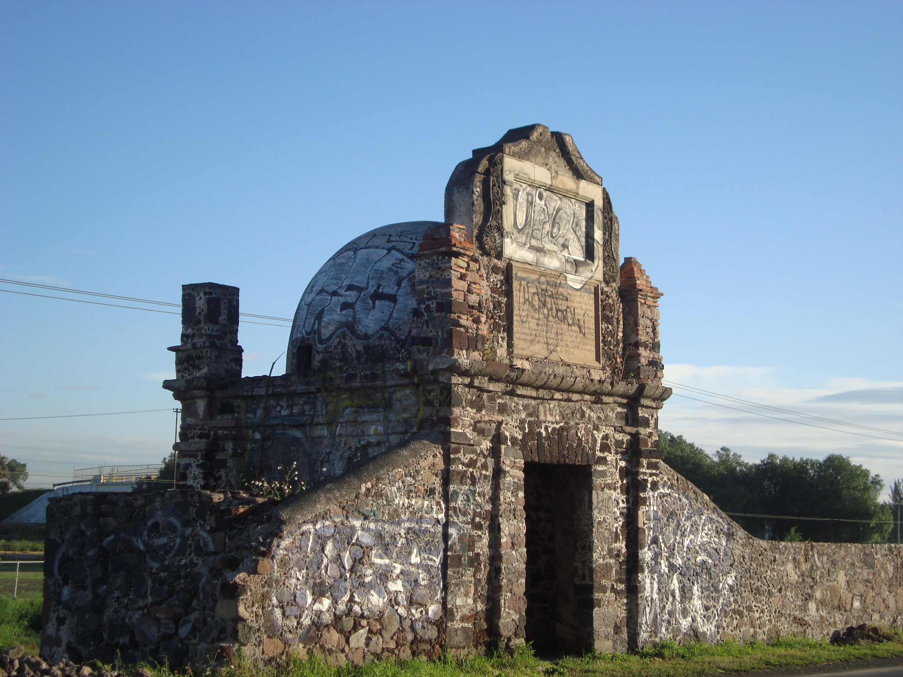 Compuerta - Capilla Cristo Rey, Ecatepec